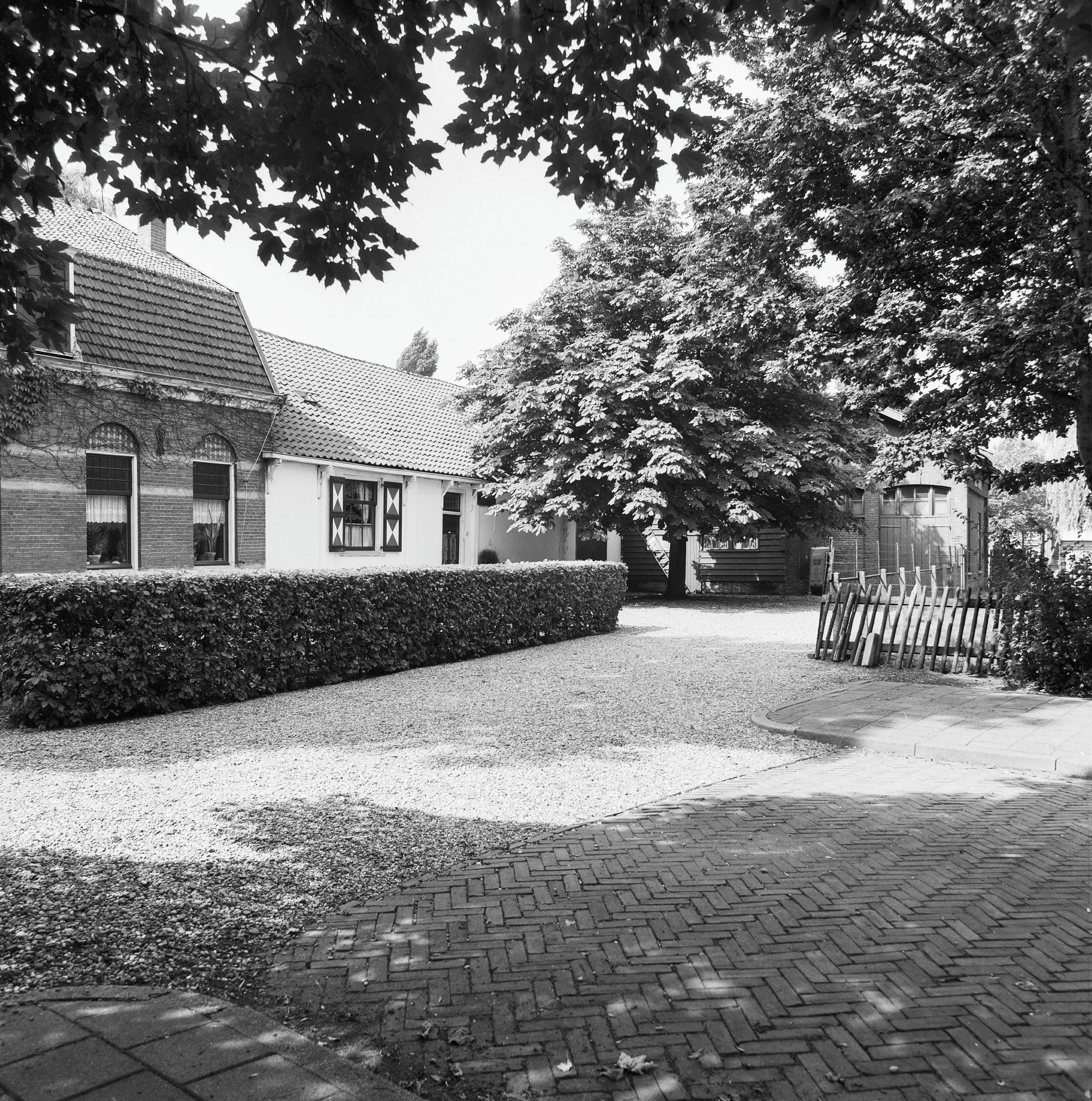 overzicht melkhuisje van de voormalige boerderij "Badhoeve"